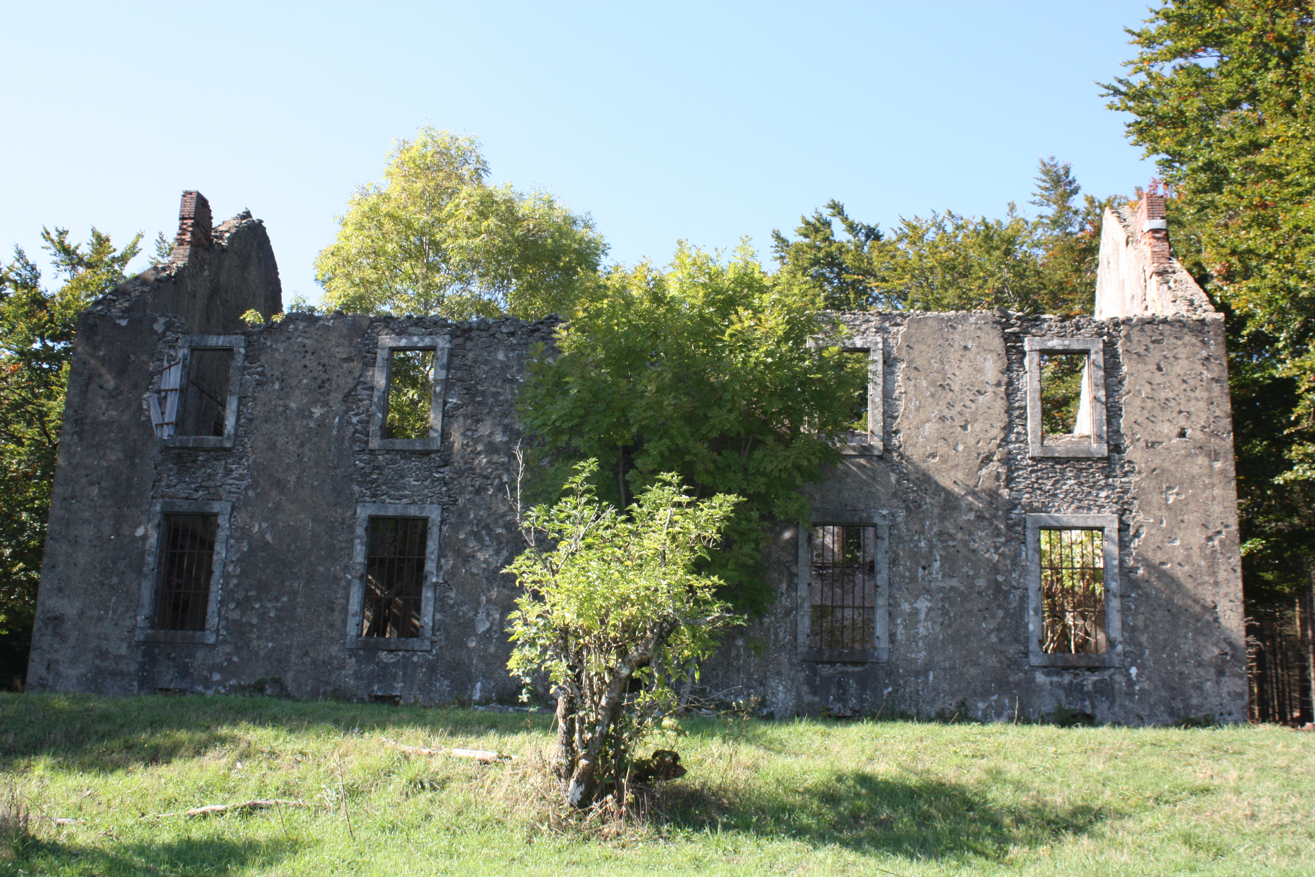 Fraisse-sur-Agout (Hérault) - Ruines du château de les Sierres